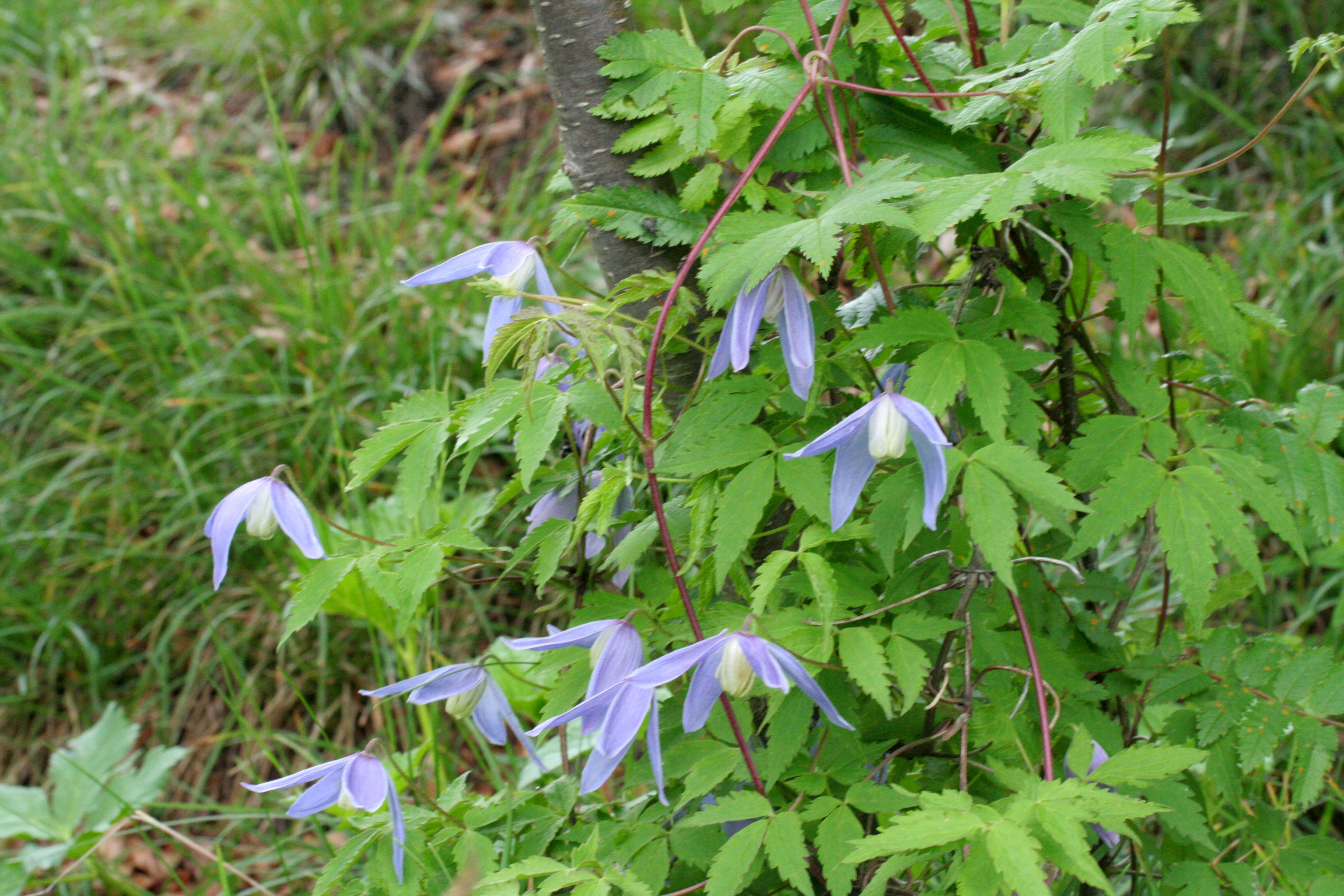 Clematis_alpina (Clematide alpina) "Giardino Botanico delle Alpi Orientali" (loc. Monte Faverghera) Belluno, quota 1500 m s.l.m.